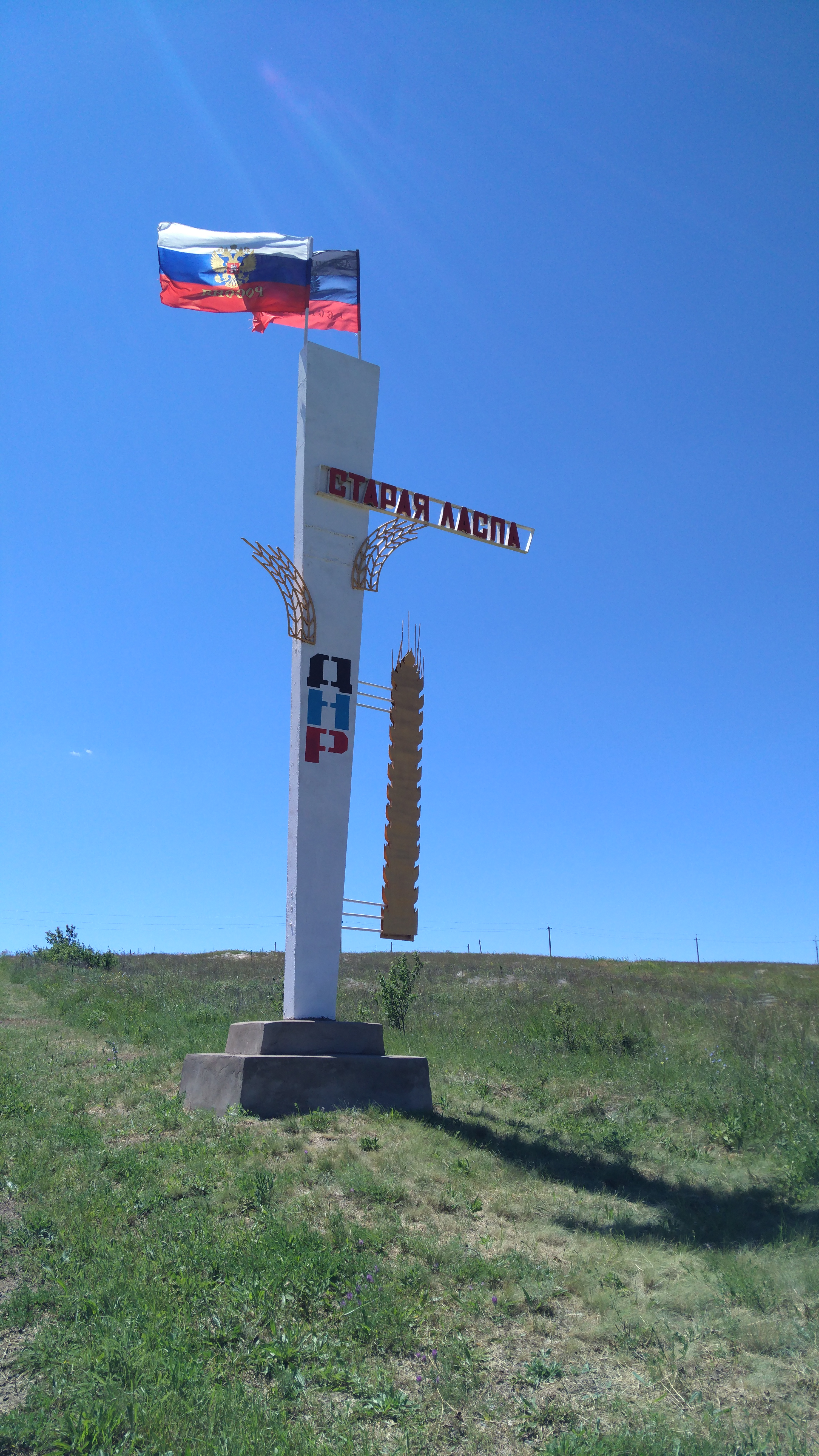 Стенд при въезде в село